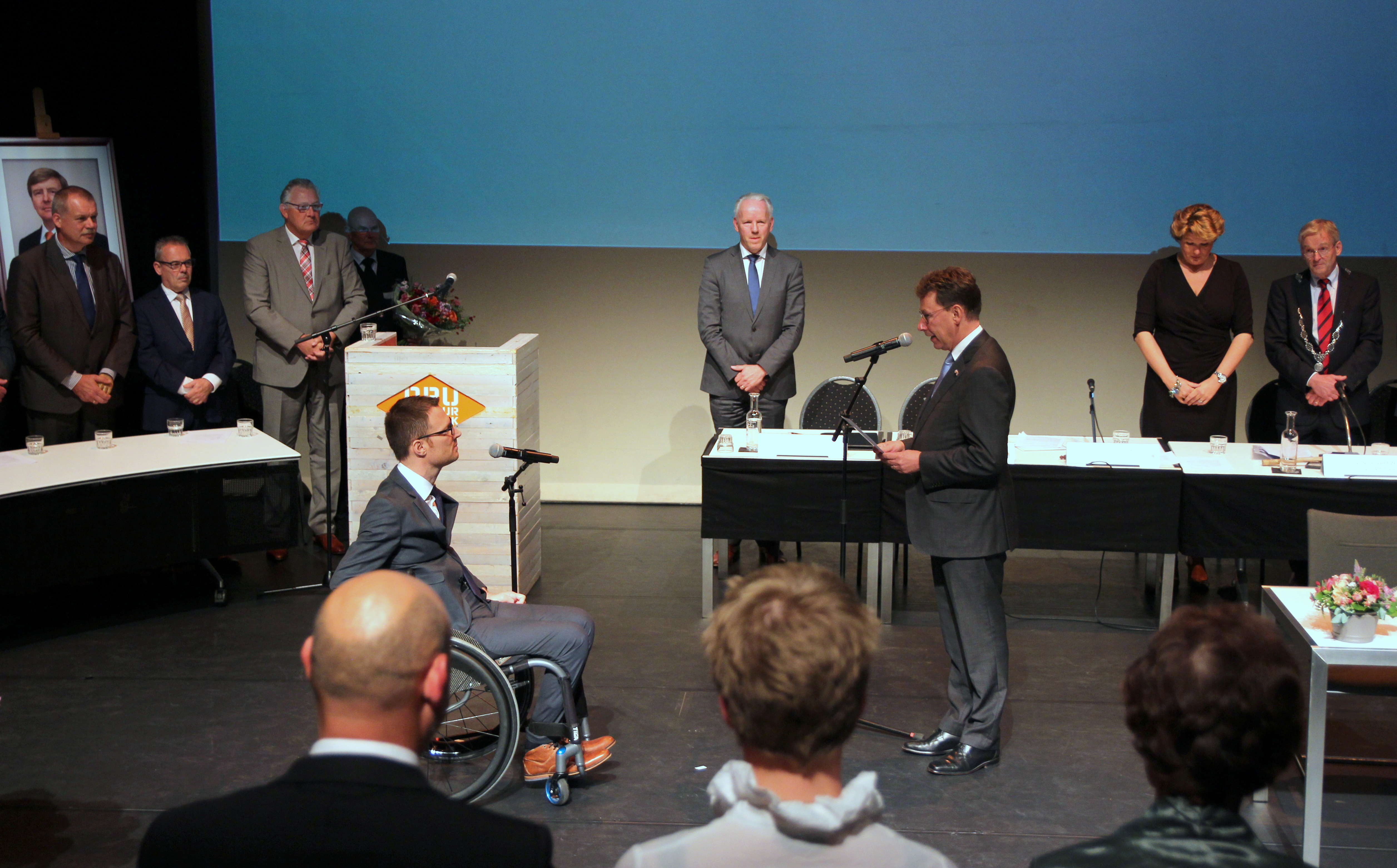 Benoeming nieuwe burgemeester van de gemeente Oude IJsselstreek, de heer Otwin van Dijk, in de theaterzaal van de DRU in Ulft.